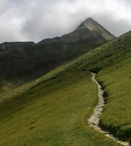 Petretxema mendia